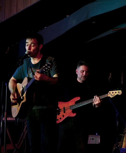 Vlada Divljan i Nevladina organizacija, Centar za kulturu, Pozarevac 06.03.2010